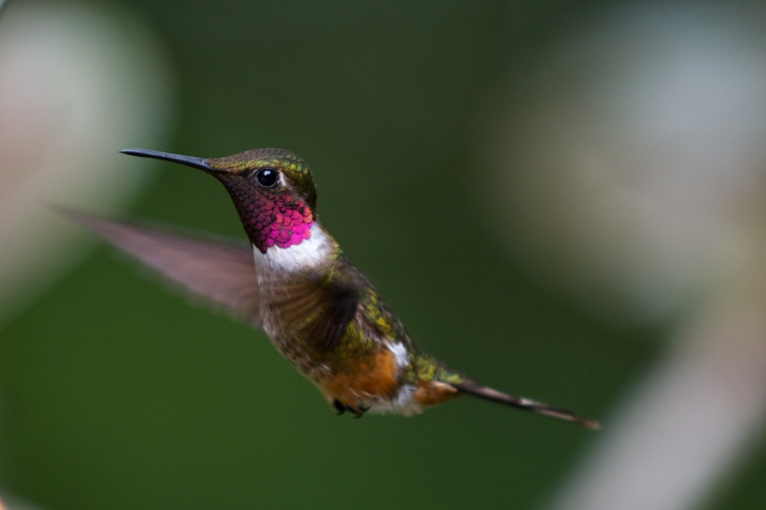 Colibri Magenta (Calliphlox bryantae) en vuelo